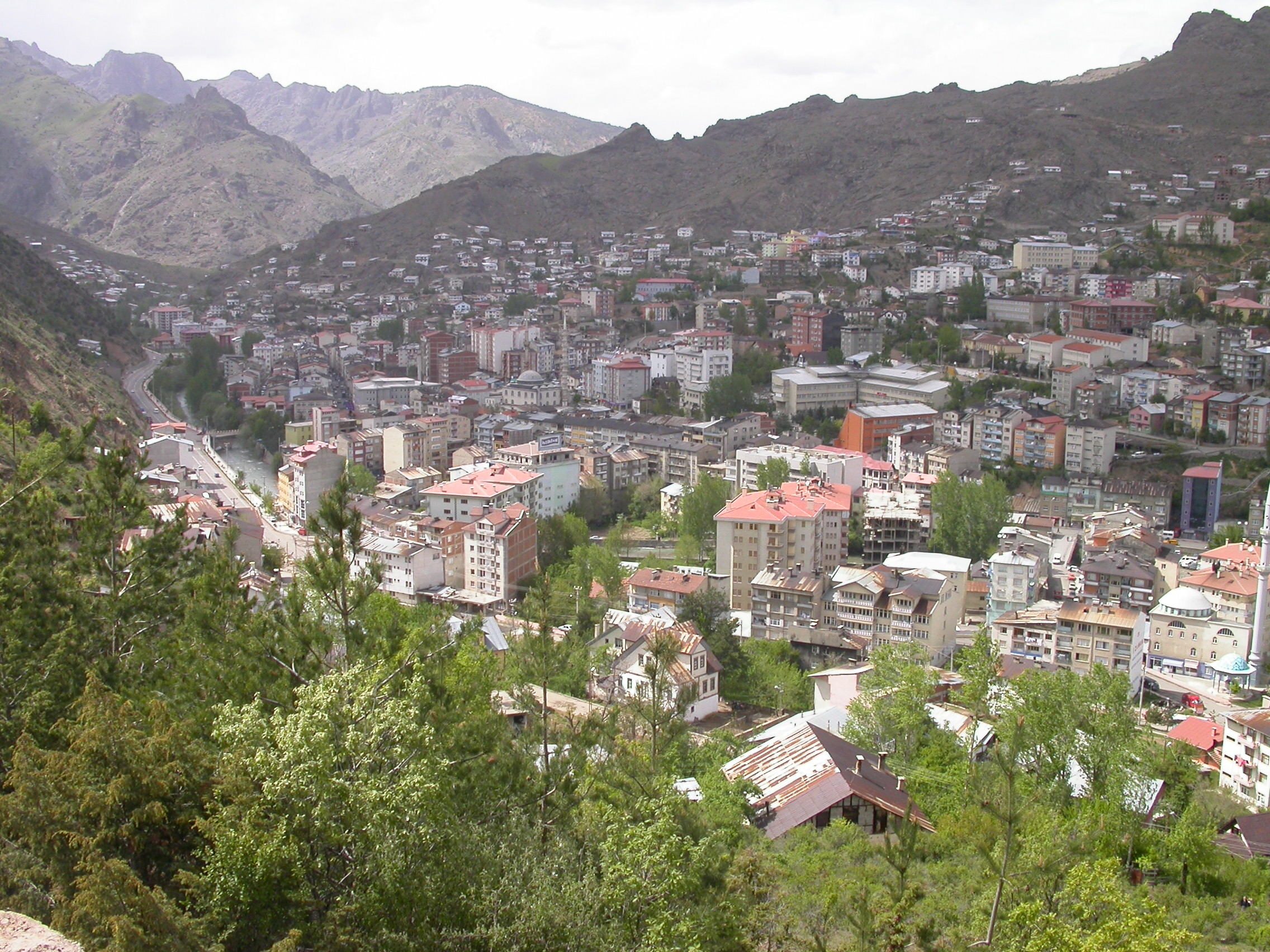 Merkez